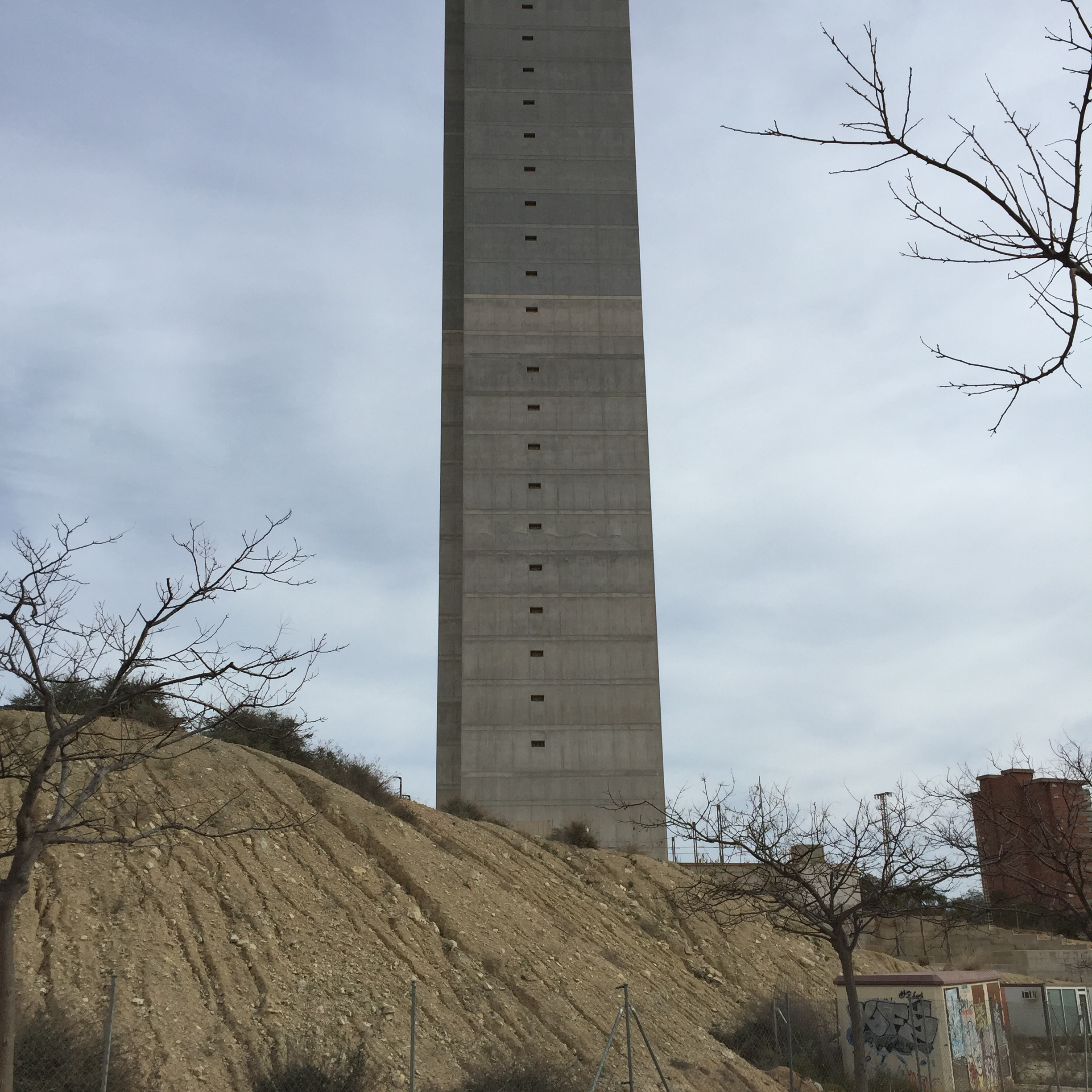 Edificio InTempo detalle hormigón